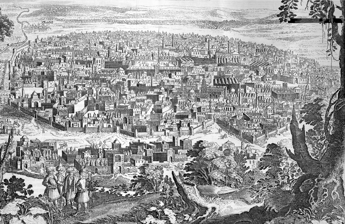 View on Isfahan, seen in Adam Olearius, Vermehrte Newe Beschreibung Der Muscowitischen und Persischen Reyse (Schleswig, 1656)